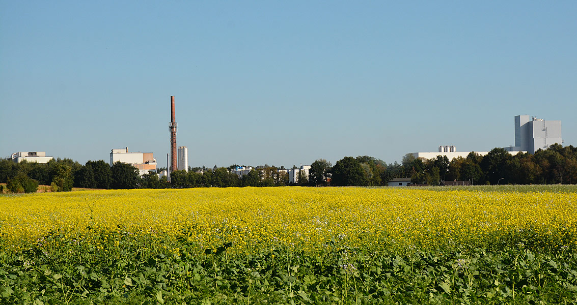 Zeven Aspe Industrie